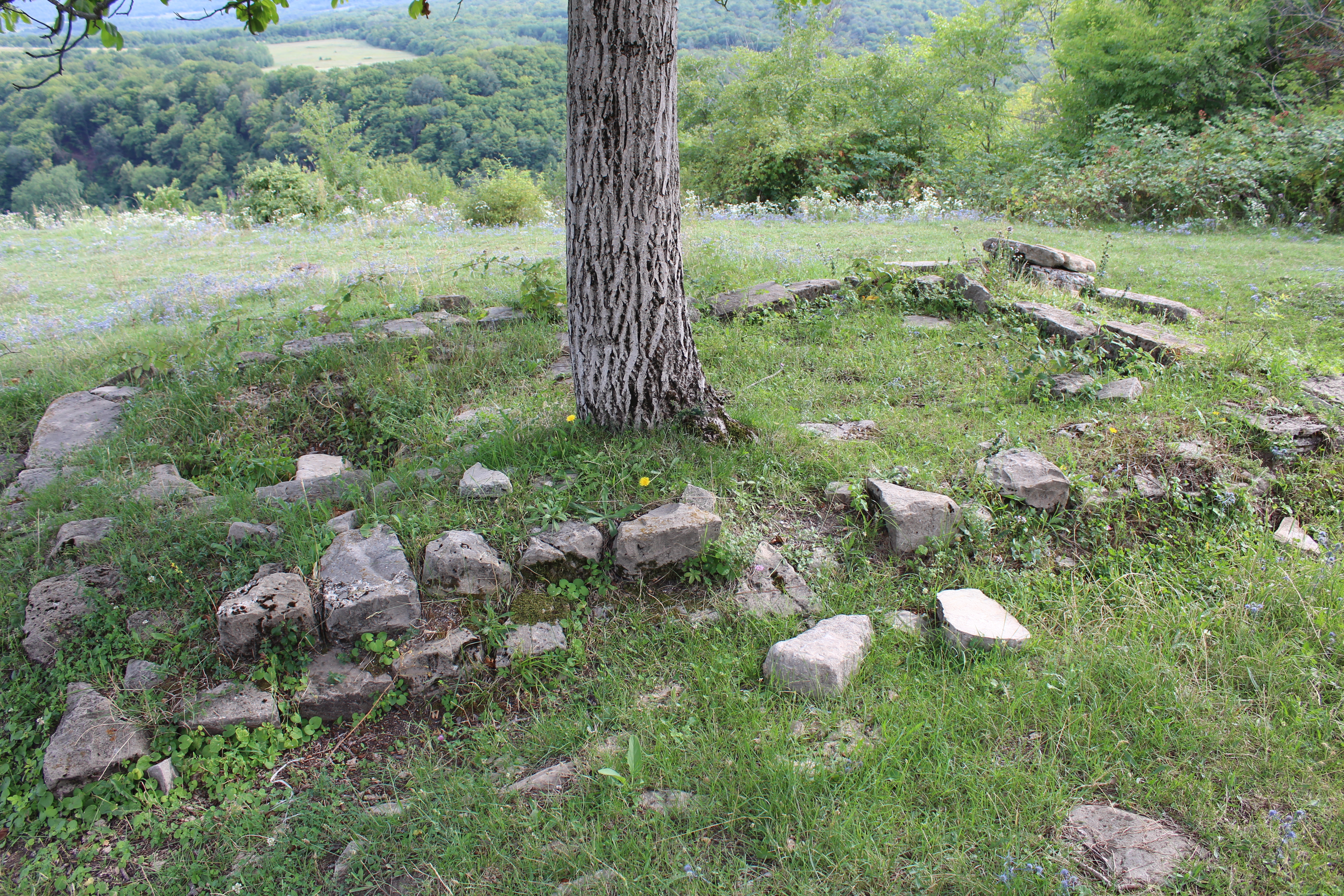 წმინდა მარინეს სახელობის ნაეკლესიარი